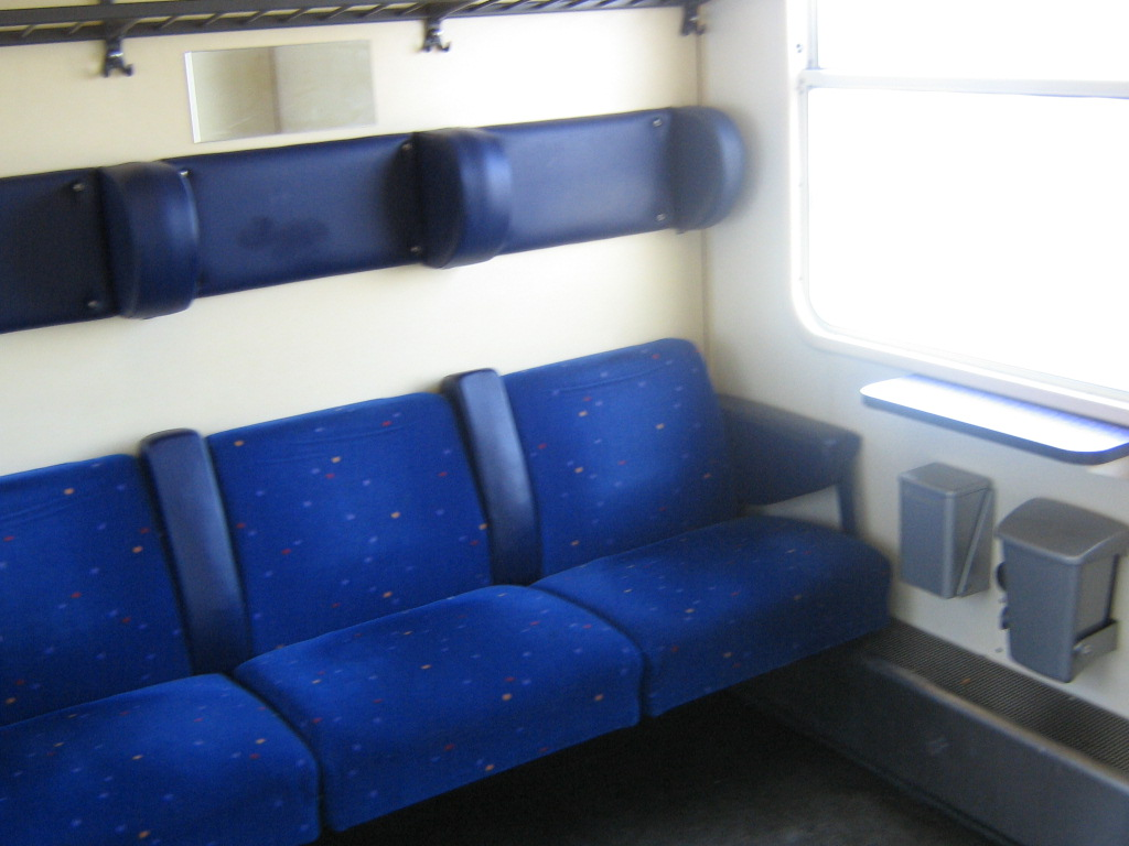 Interieur ICK 2e klas